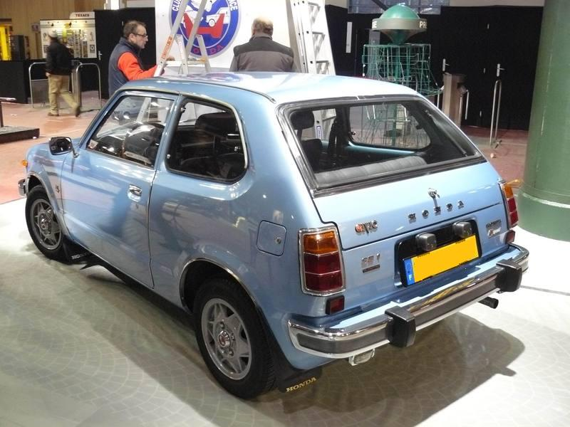 Retromobile 2012